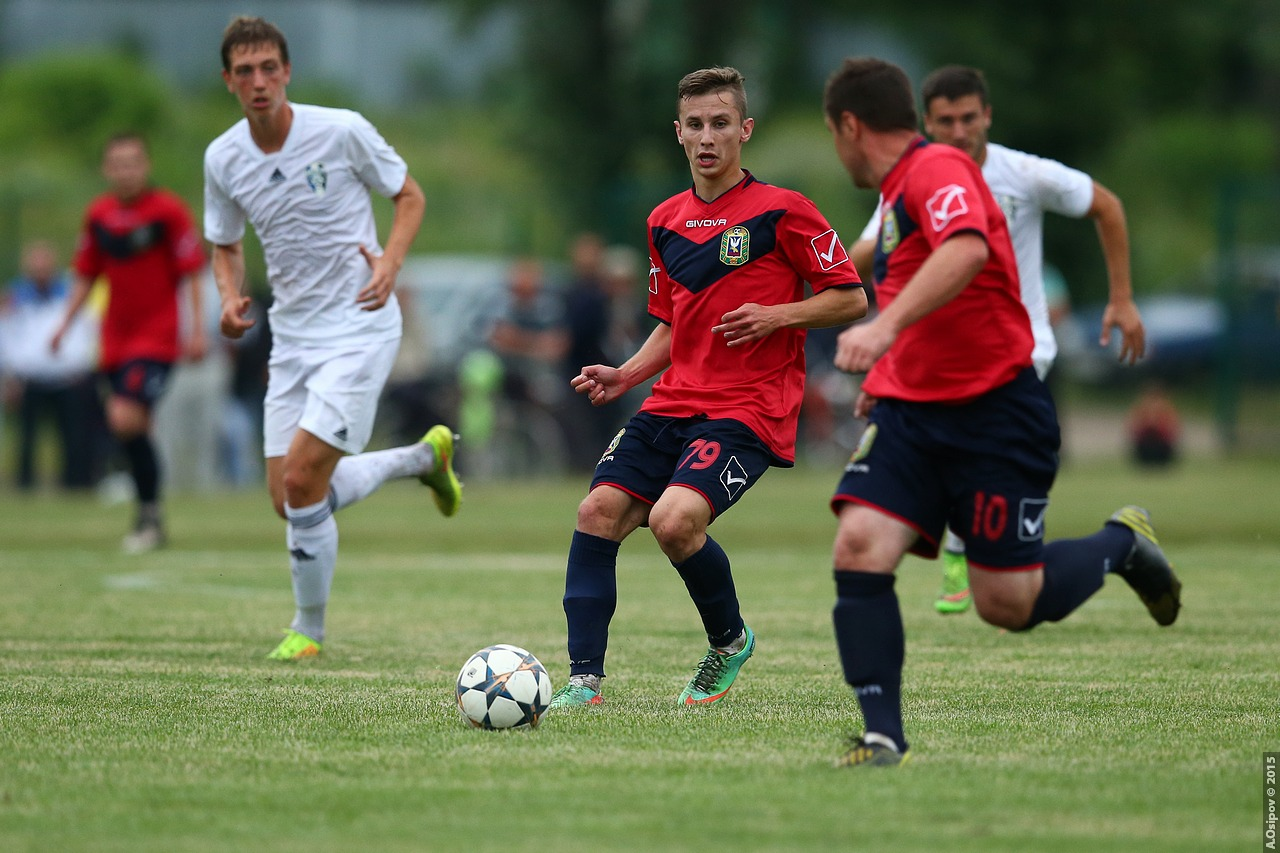 18.06.2015 Чемпионат Украины среди аматоров. Колос (Зачепиловка) - Балканы (Заря) - 0:0 «Колос» (Зачепиловка): Антоненко, Кучук (Нерубенко, 61), Васильев, Билык, Цапий, Михайлюк, Жданов (к), Тарасов, Батусов, Дяченко (Воробей, 79), Шарко. Запасные: Давыдов, Кателин, Котенко, Бодня. «Балканы» (Заря): Паламарчук, Д.Пархоменко, Саламаха, Ильницкий, Пенов (Полтавец, 90+4), Гаврилюк, К.Пархоменко, В.Златов (Е.Райчев, 70), Урсуленко, А.Райчев (к), В.Кириллов (Лазаренко, 81). Запасные: Потароченко, А.Кириллов, Голубев, Куртов. Предупреждения: Тарасов, 44; Шарко, 79 – В.Златов, 23; В.Кириллов, 63; Гаврилюк, 67; Пенов, 87. Судьи: А.Омельченко (Славянск), Д.Сердюк (Полтава), В.Попков (Волноваха). Четвертый арбитр – А.Афанасьев (Норцовка, Харьковская область). Наблюдатель арбитража – В.Головко (Днепропетровск).